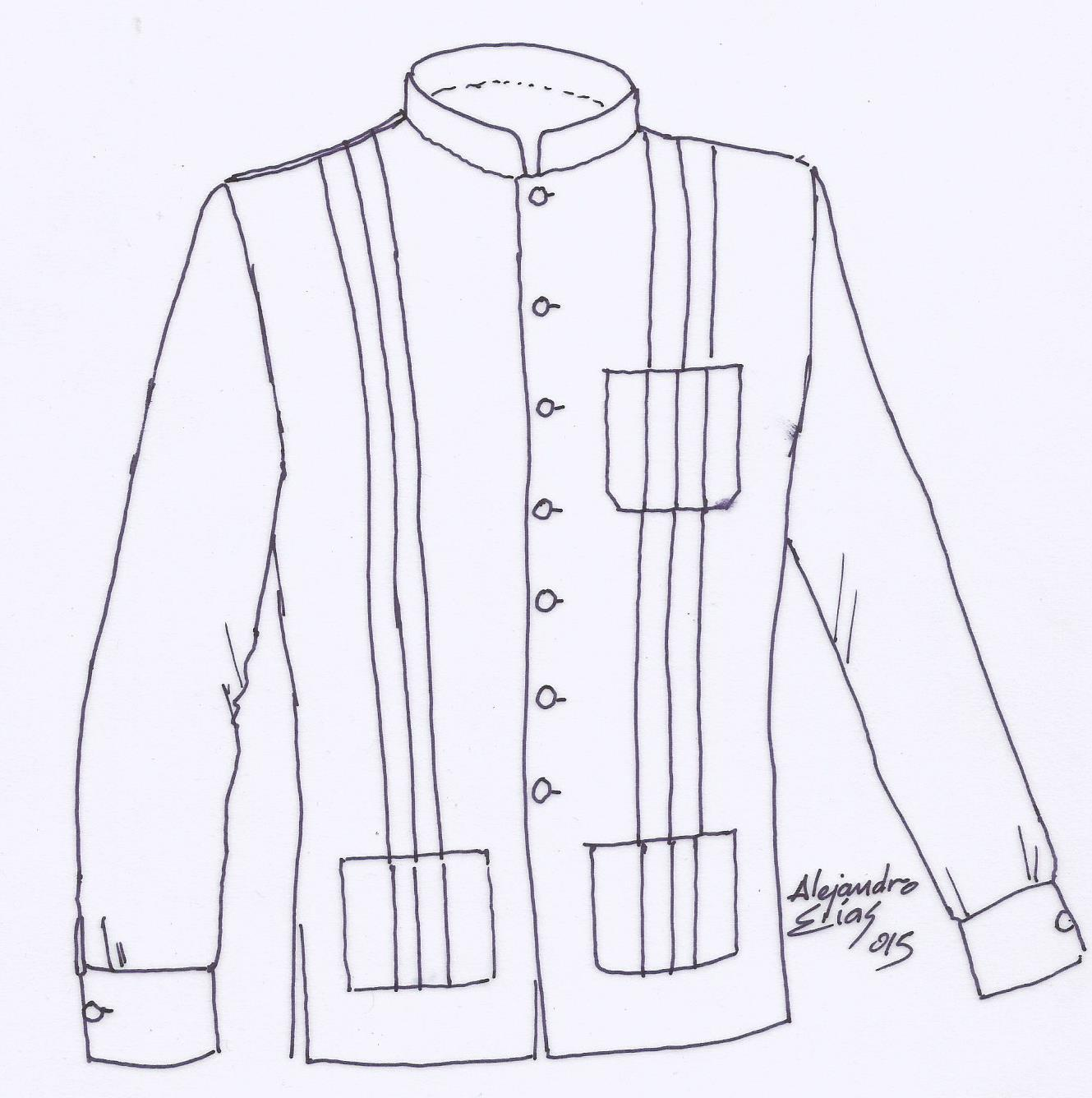 Indumentaria masculina de Ecuador